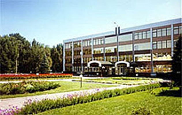 заводоуправление "Стирол"